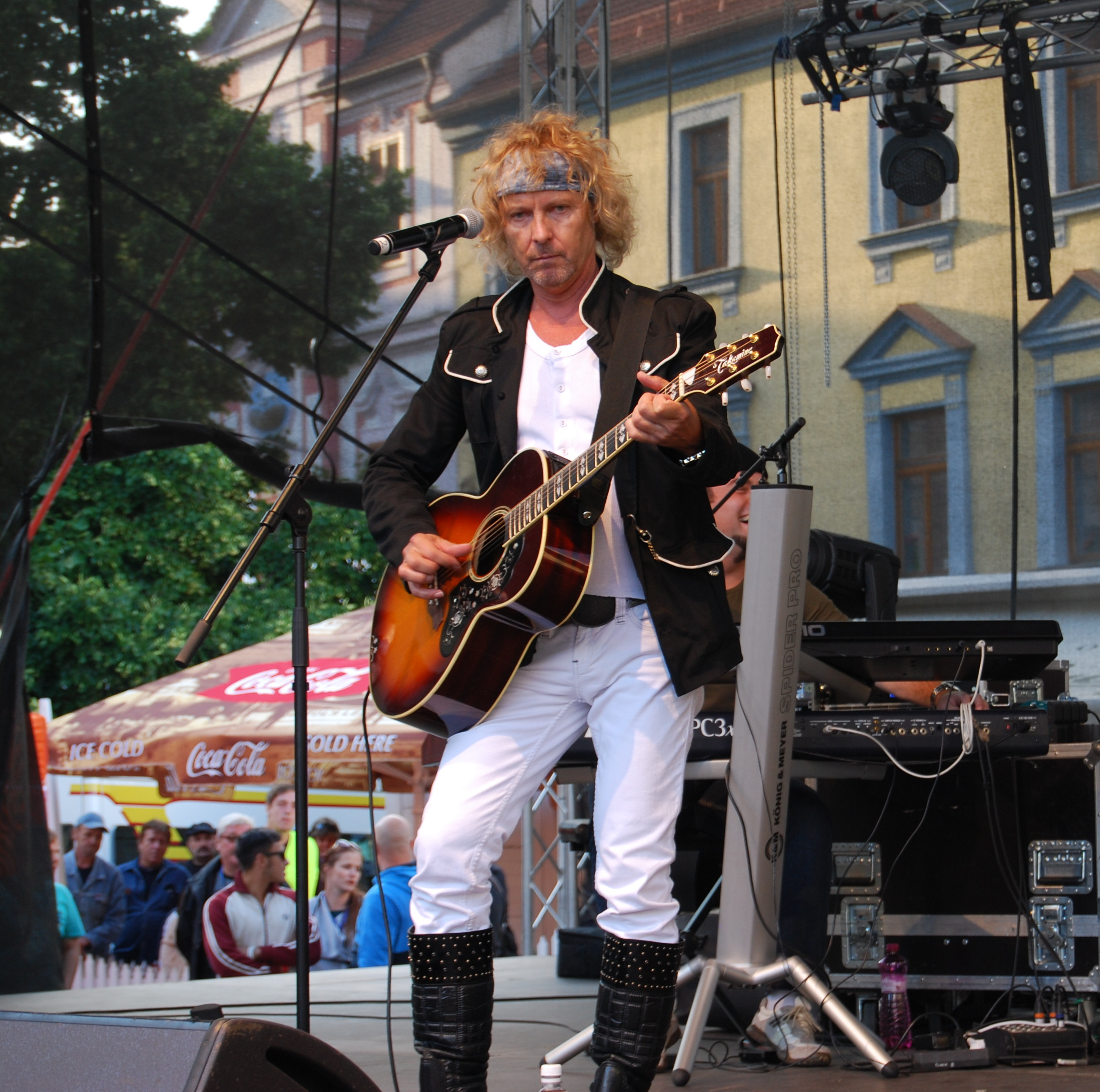 Peter Nagy a skupina Indigo. Městská slavnost Dotkni se Písku 2014. Velké náměstí. Písek. Jihočeský kraj. Česká republika. Personality rights warning Although this work is freely licensed or in the public domain, the person(s) shown may have rights that legally restrict certain re-uses unless those depicted consent to such uses. In these cases, a model release or other evidence of consent could protect you from infringement claims.